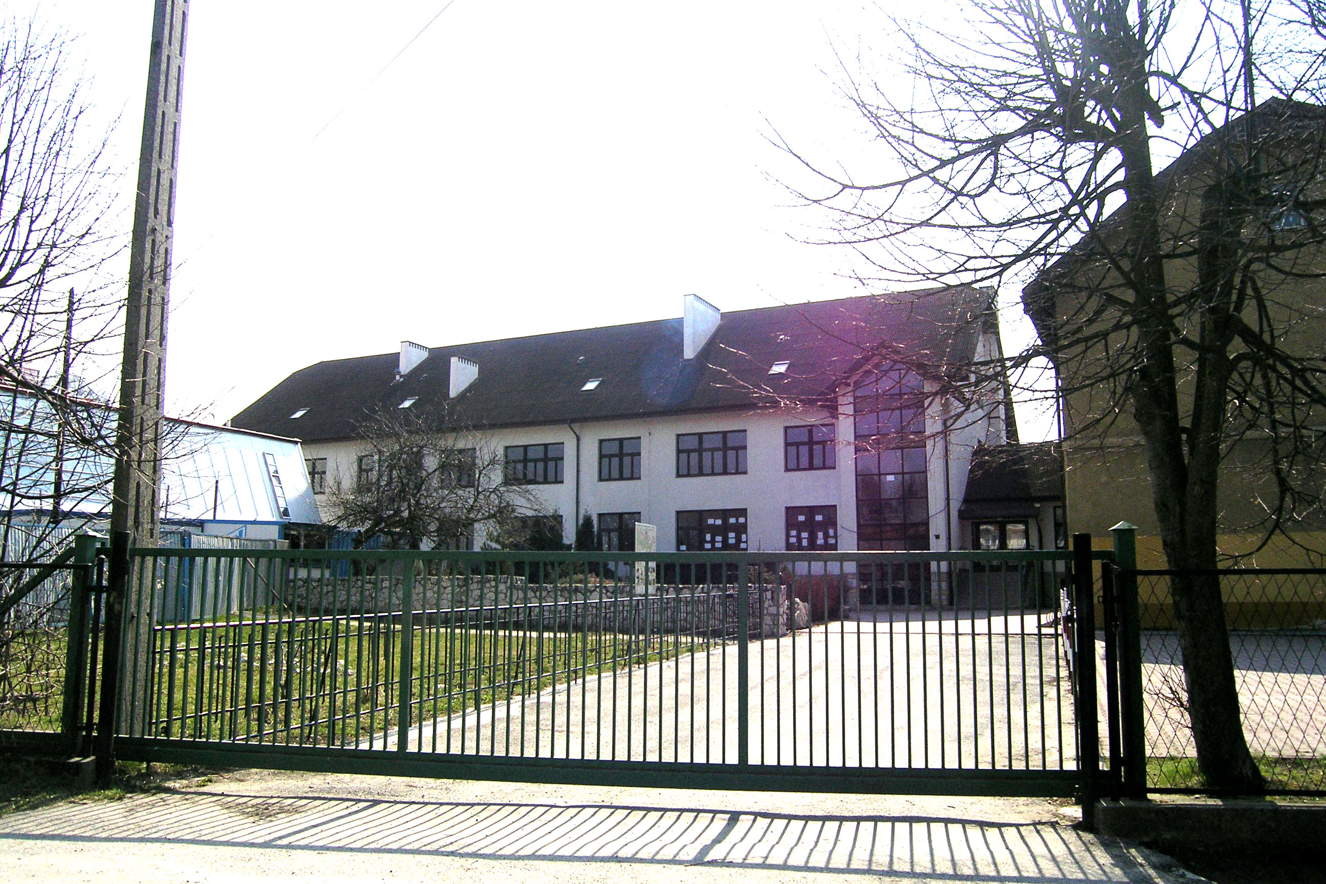 Budynek szkoły SP i Gimnazjum w Tenczynku